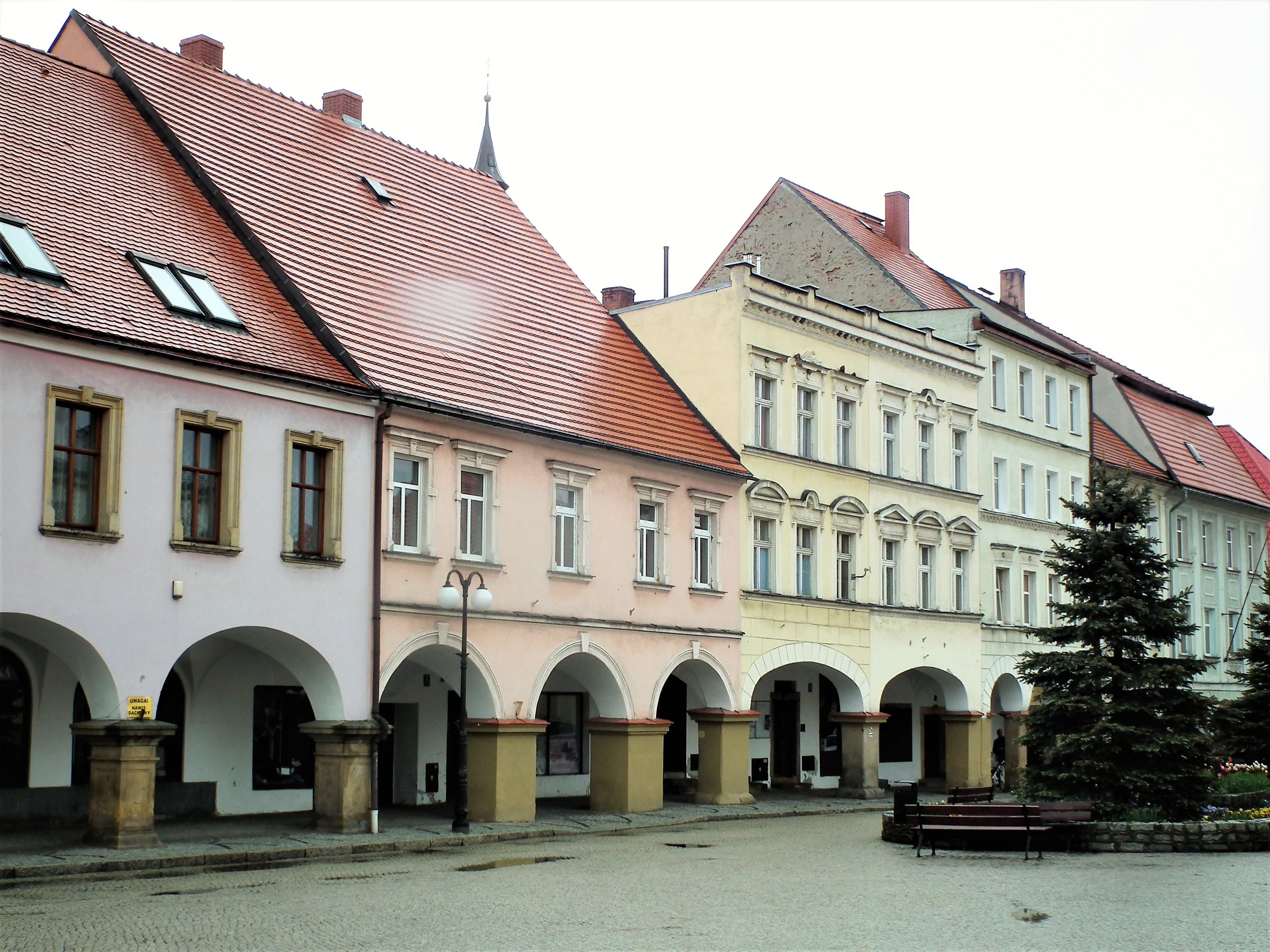 Rynek w Lubawce.